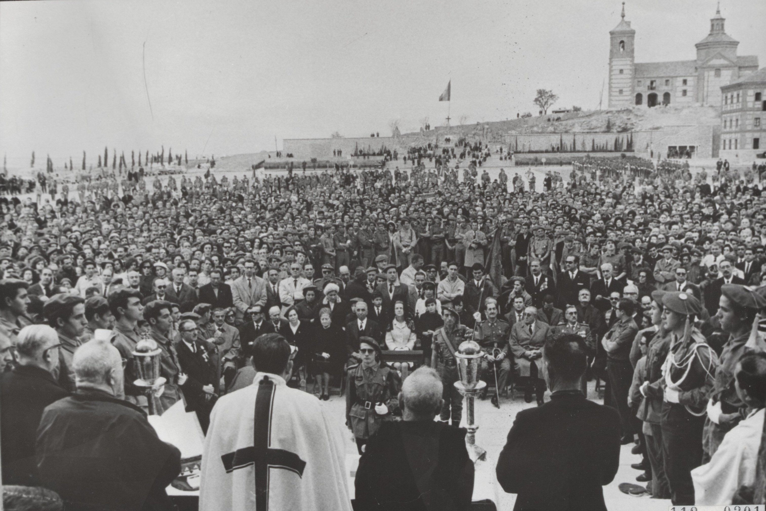 Reunión anual de los carlistas en el cerro de Los Ángeles en Madrid. En lugar del príncipe Carlos Hugo, asistió la princesa Irene.